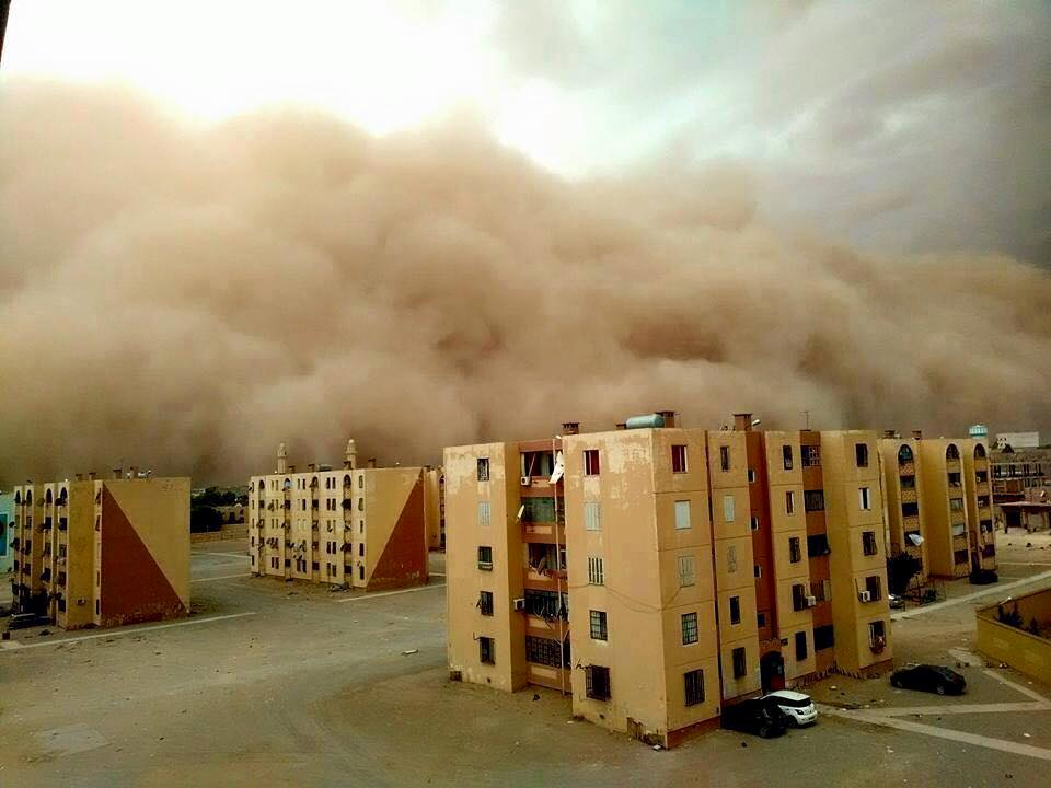 Djelfa, Algeria